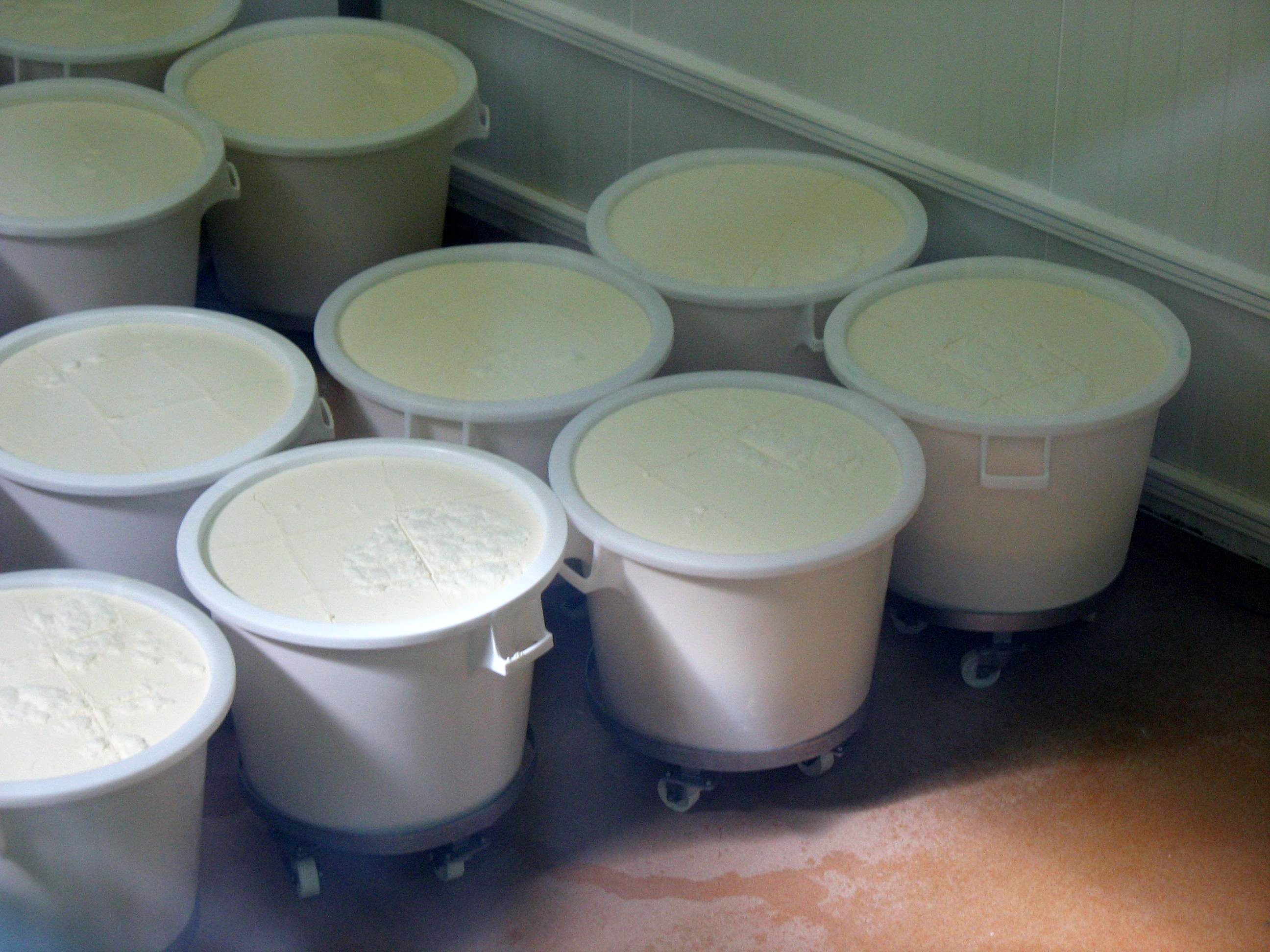 Cette photo a été prise par moi-même.